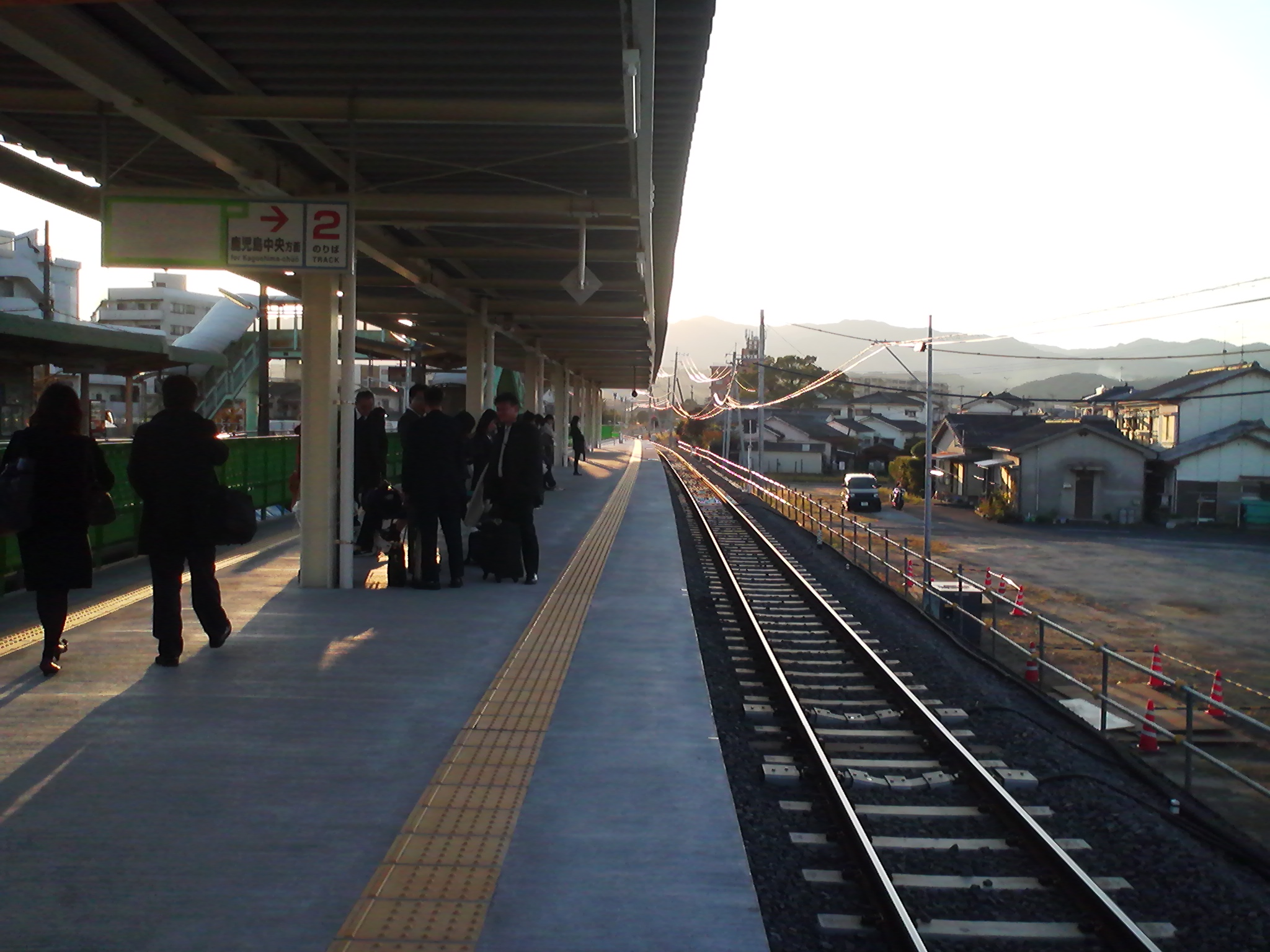 谷山駅の高架化事業に伴う線路移動に伴い仮設された鹿児島方面のホーム。